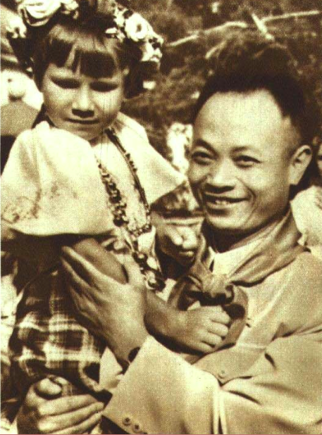 1951年冯文彬 第三届世界青年与学生和平联欢节